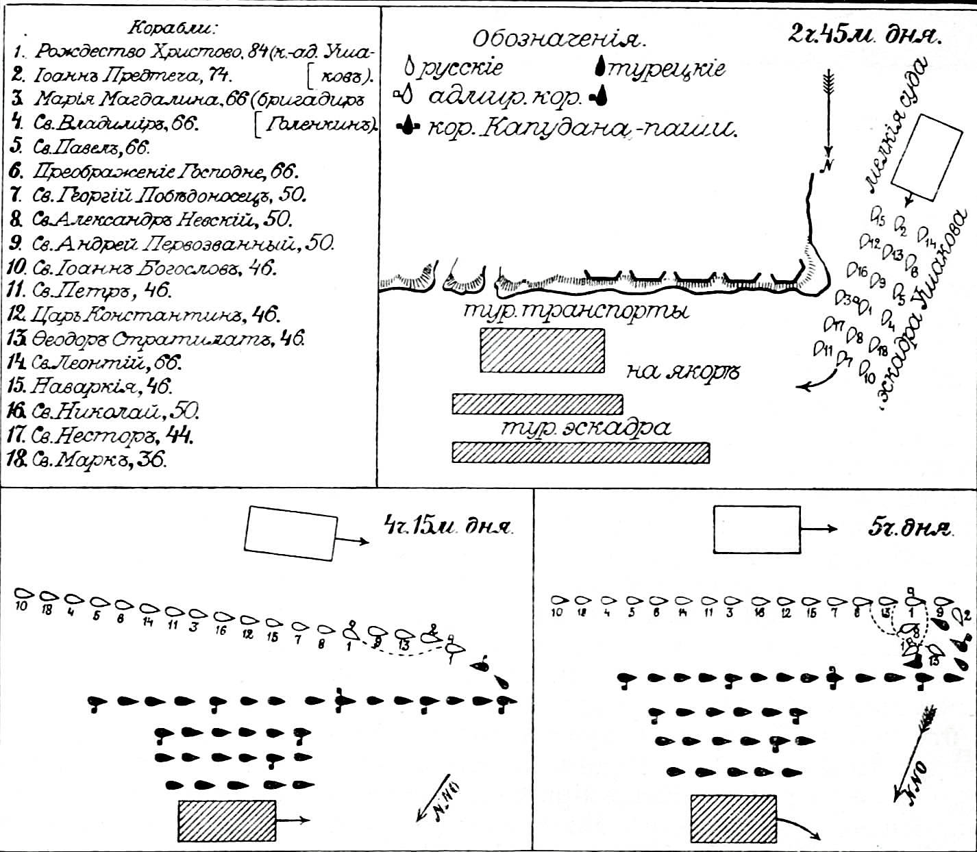 Это изображение было использовано для иллюстрирования статьи «Калиакрия» опубликованной в одиннадцатом томе «Военной энциклопедии», который был издан книгоиздательским товариществом И. Д. Сытина в 1913 году в столице Российской империи городе Санкт-Петербурге.